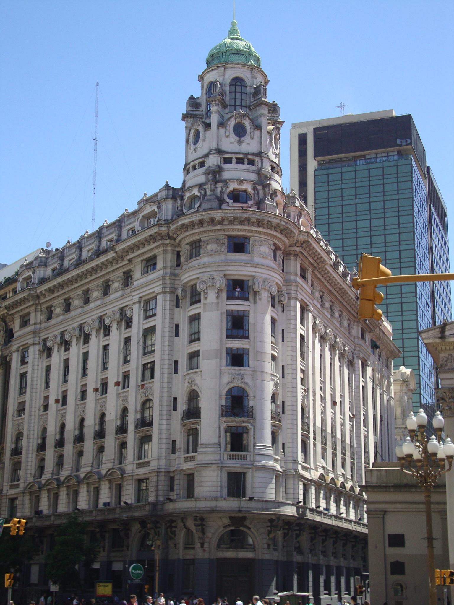 Edificio del Banco Argentino Uruguayo en Buenos Aires. En la actualidad es una de las sedes de la Jefatura de Gabinete de Ministros de la Nación. Diagonal Norte, esquina San Martín.